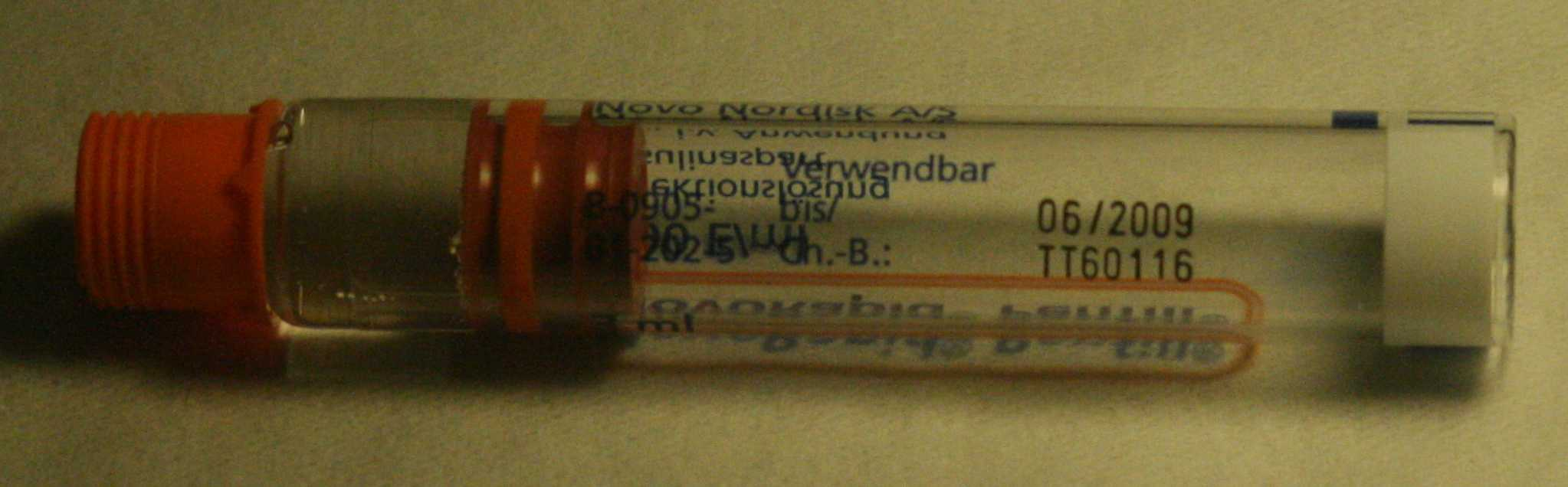 Zylinderampulle